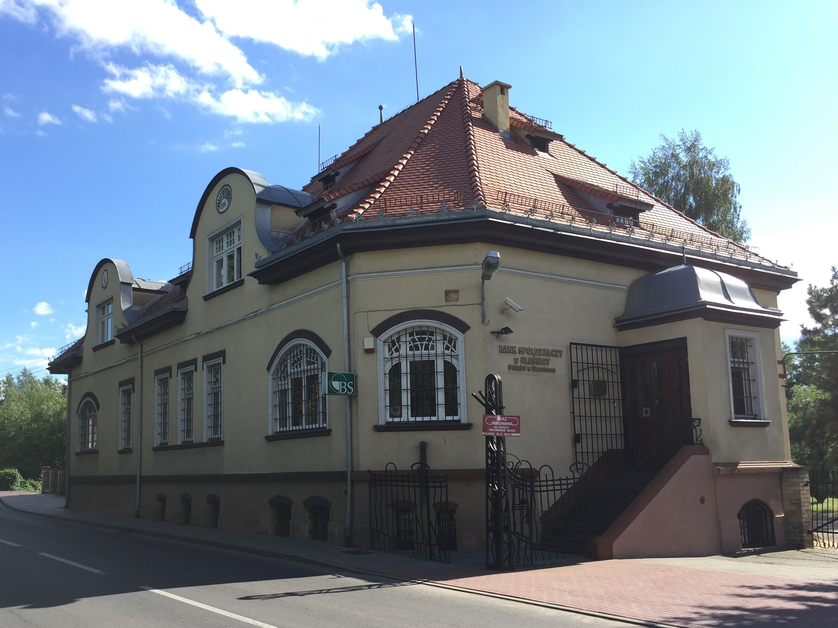 Bank Spółdzielczy w Bierutowie